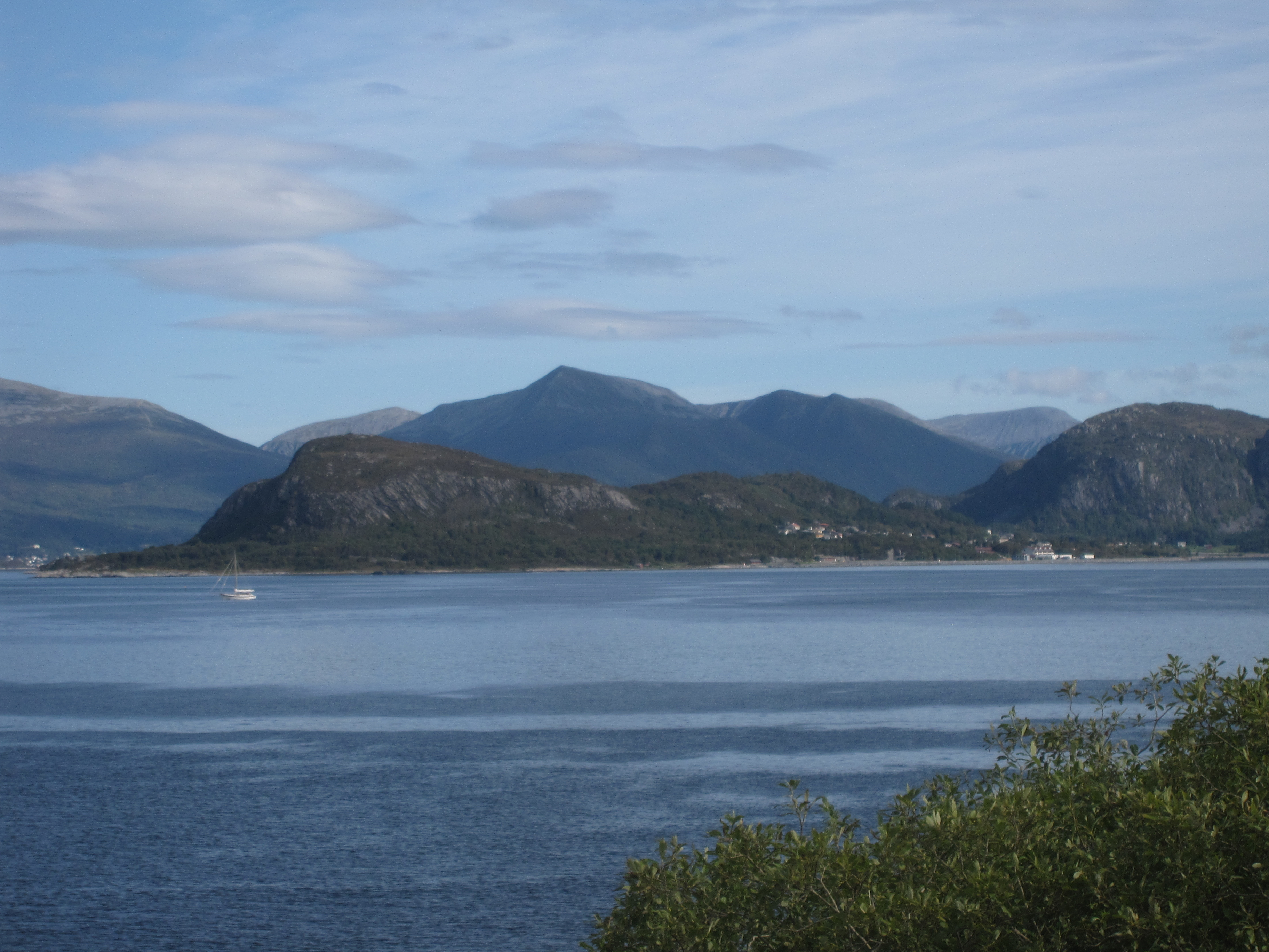 749 (moh) Søvik, Haram kommune, september 2011 sett sørfra